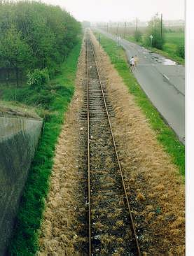 Voie ferrée quelques jours après passage d'un train désherbeur printemps 1998 ou 1999 près de Bailleul (nord de la France). Le désherbage chimique aggrave l'effet de fragmentation écologique induit par la route départementale voisine.